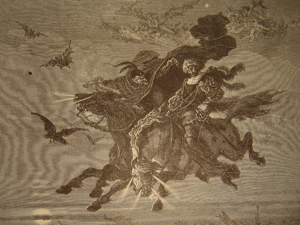 Faust et Mephistophles au sabbat par de Neuville